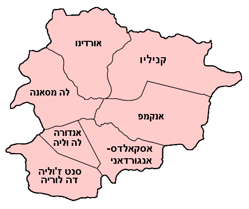 תיקונים למקור רישיון קטגוריה:תמונות להעברה לוויקישיתוף